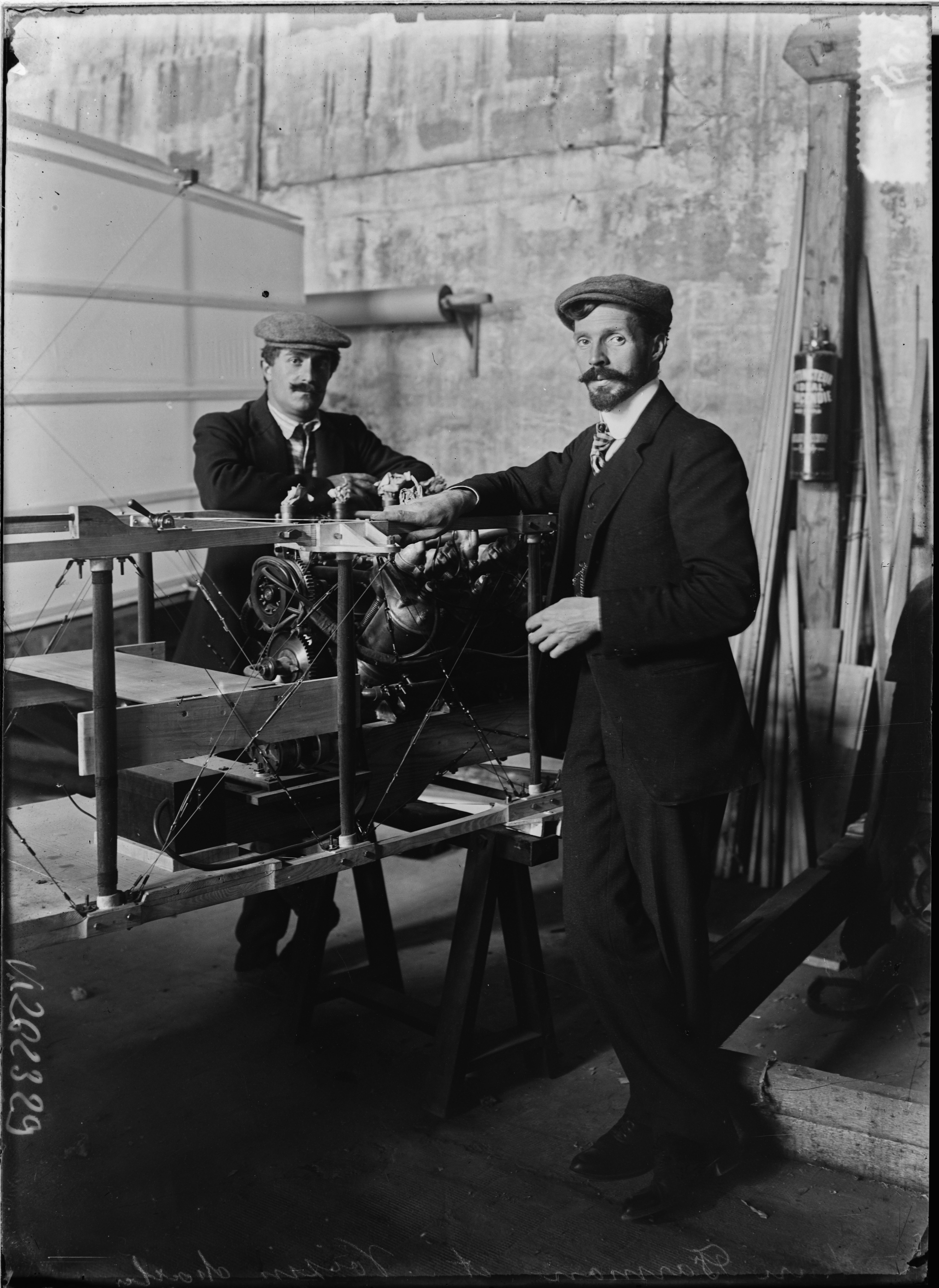 Die französischen Flugpioniere Charles Voisin (links) und Henri Farman (rechts)